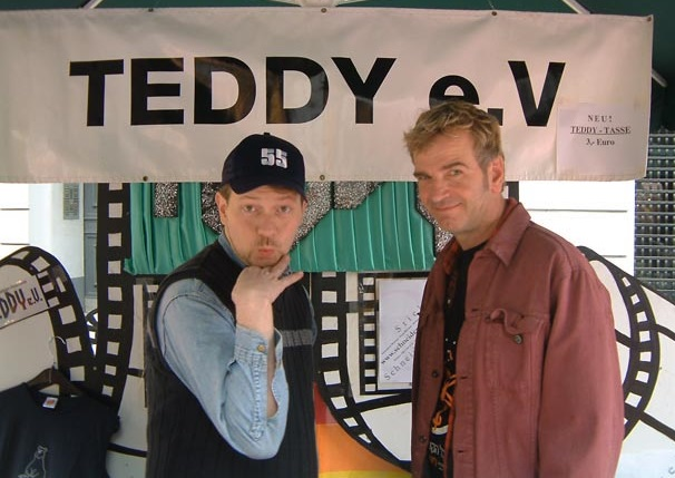 Teddy Award Infostand Schwullesbisches Stadtfest Berlin, Sommer 2003: BeV StroganoV (Mitglied Teddy e.V.) und Wieland Speck (Leiter Section Panorama der Berlinale)